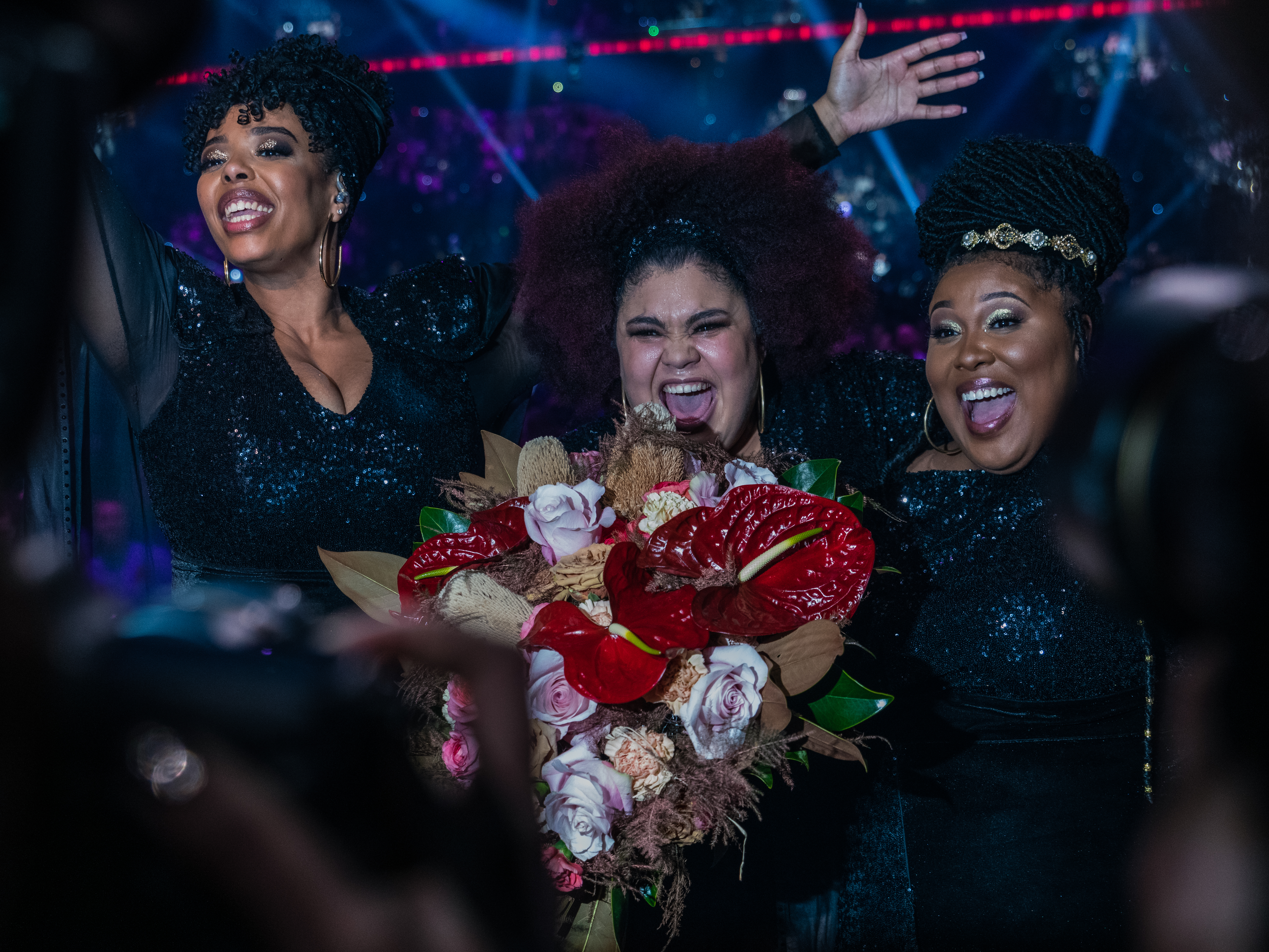 The Mamas tar emot priset vid finalen i Melodifestivalen 2020